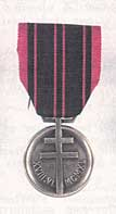 Médaille de la Résistance française - Guerre 1939-1945